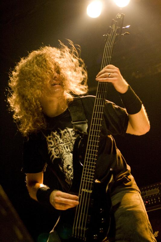 Cannibal Corpse Live @ Santana Hall - 21/02/2010 - São Paulo, Brasil É proibida a cópia ou reprodução deste material sem a autorização do autor. Por favor, não publique nada daqui sem o devido crédito. Fotógrafo: Alexandre Cardoso